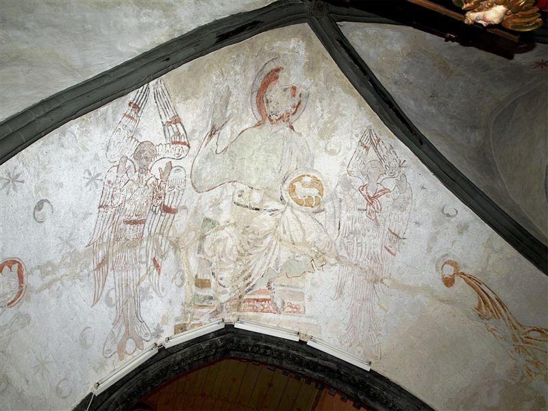 Alstadhaug kirke